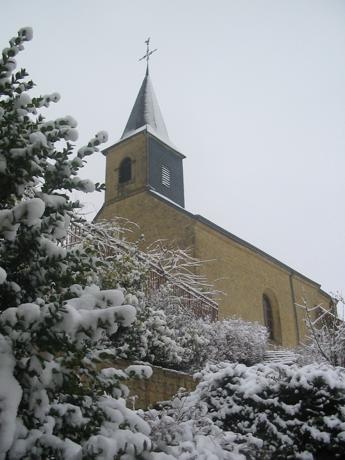 Eglise de Sury